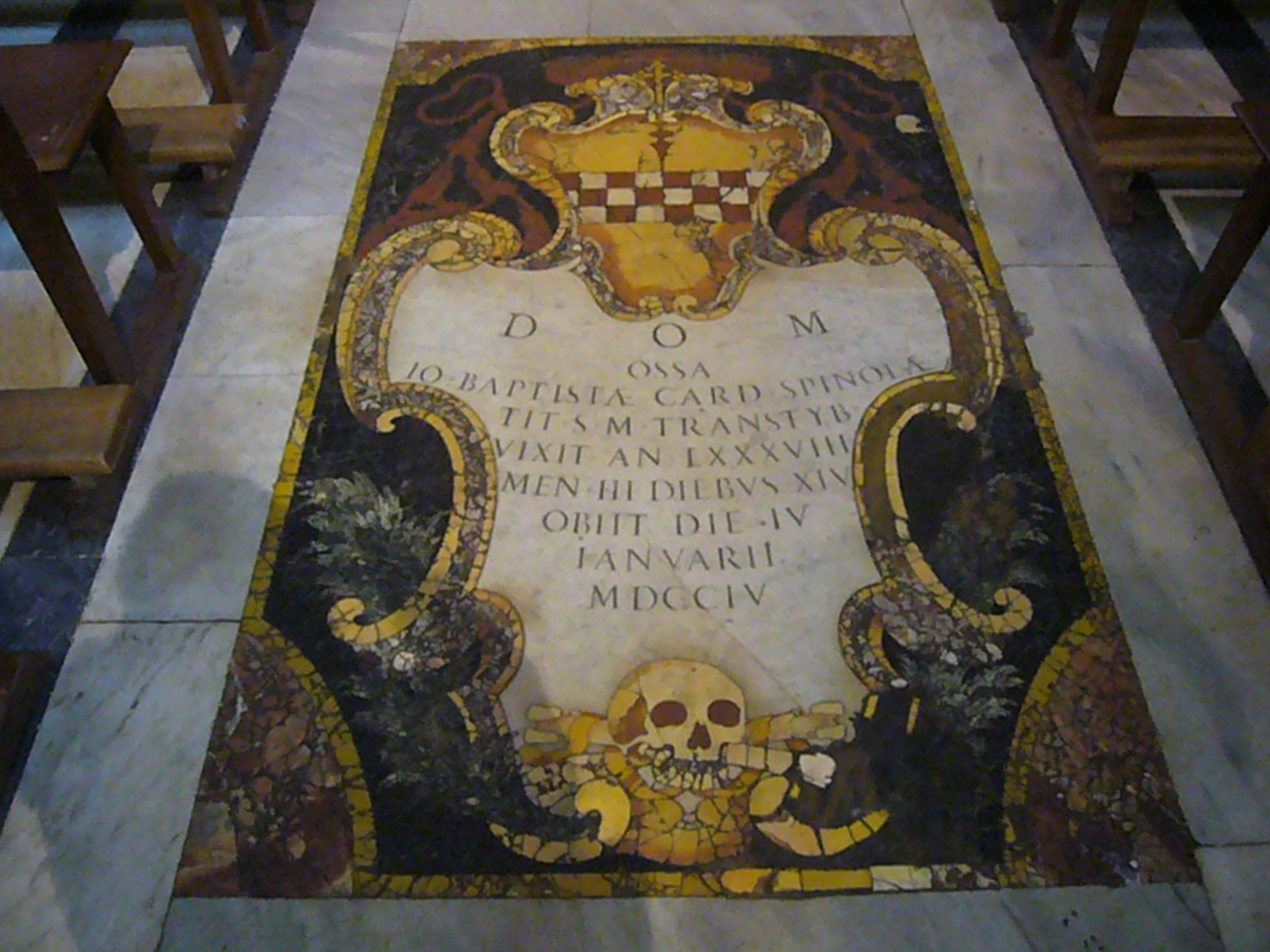 Roma, san Salvatore alle Coppelle, tomba del cardinale Giambattista Spinola (1704).